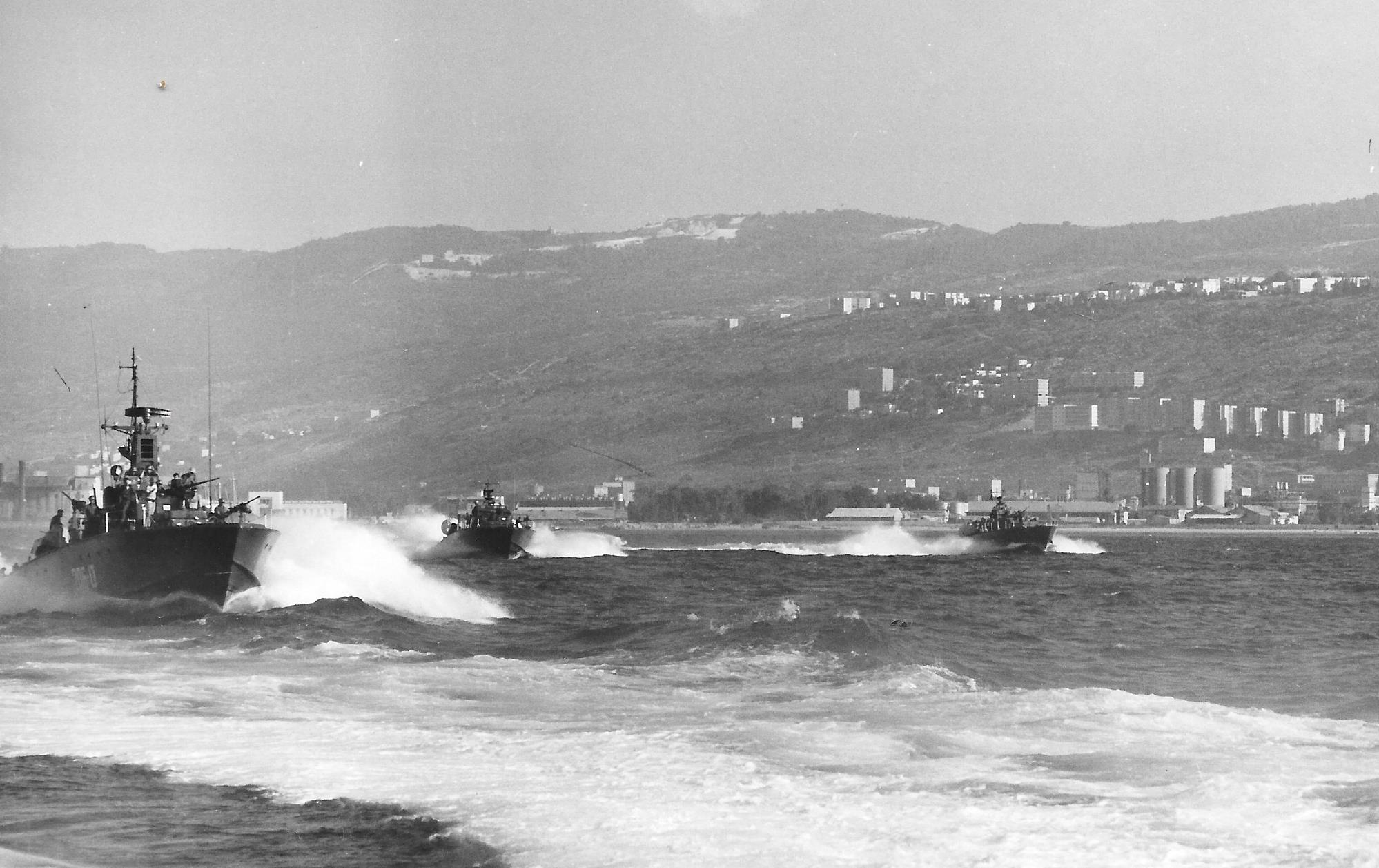 טרפדות פלגה 914 יוצאות לים במפרץ חיפה